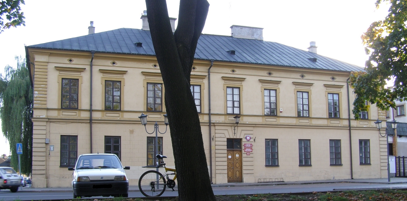 County Hall in XIX century in Mińsk Mazowiecki